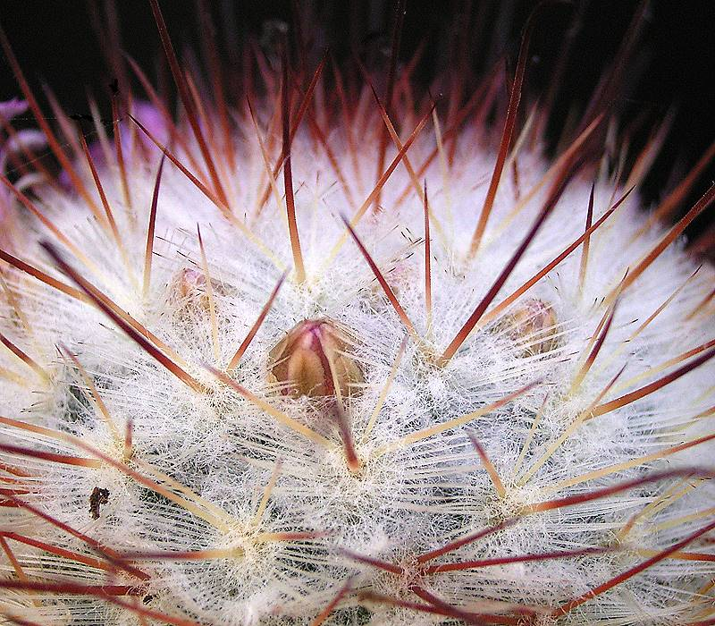 Mammillaria bombycina